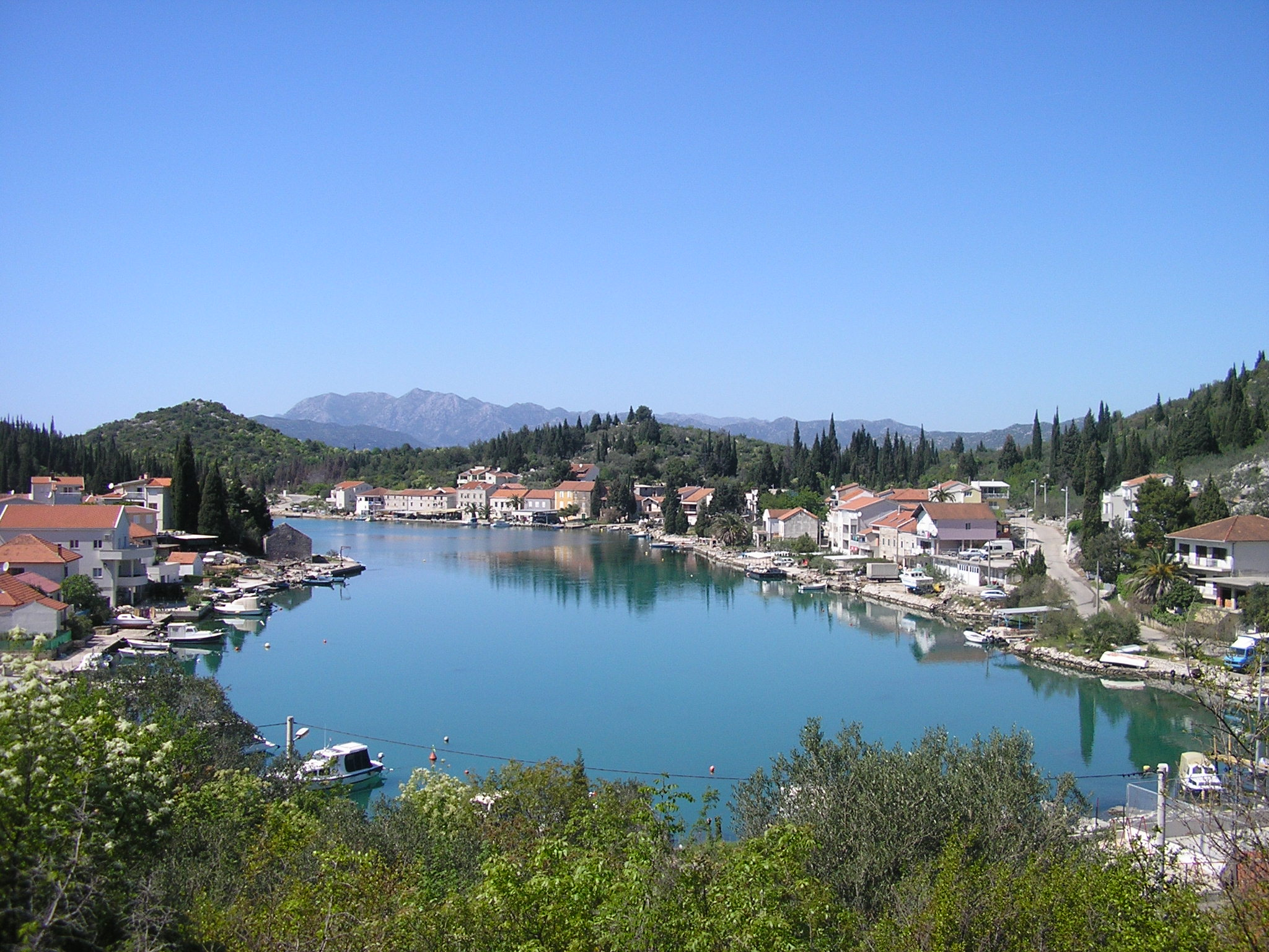 Blace